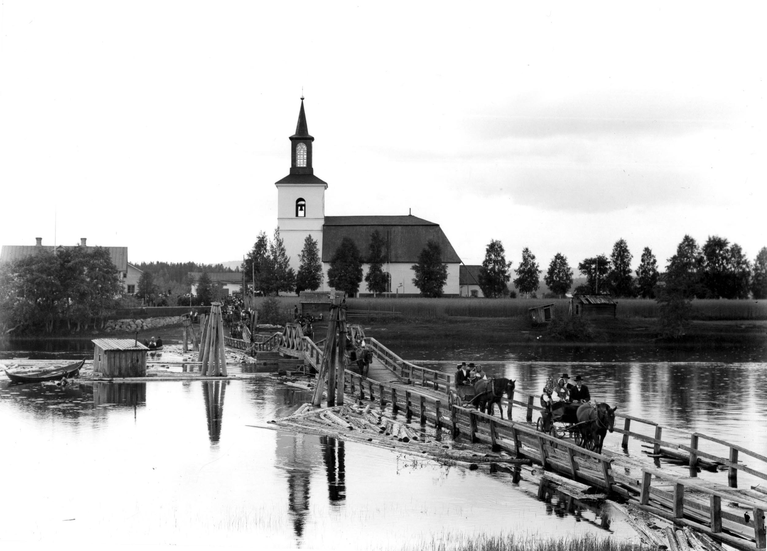 Brudfölje (Kronbrud) åker från Floda kyrka, över Flottbron